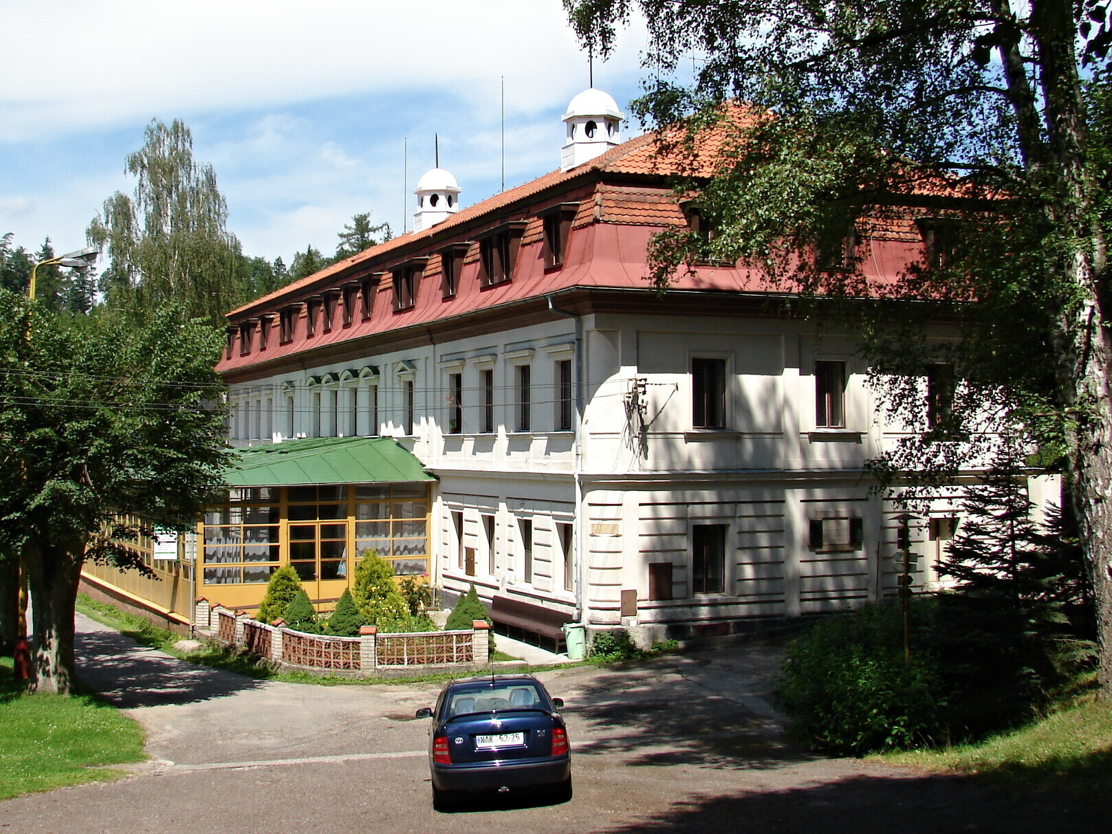 Rezek